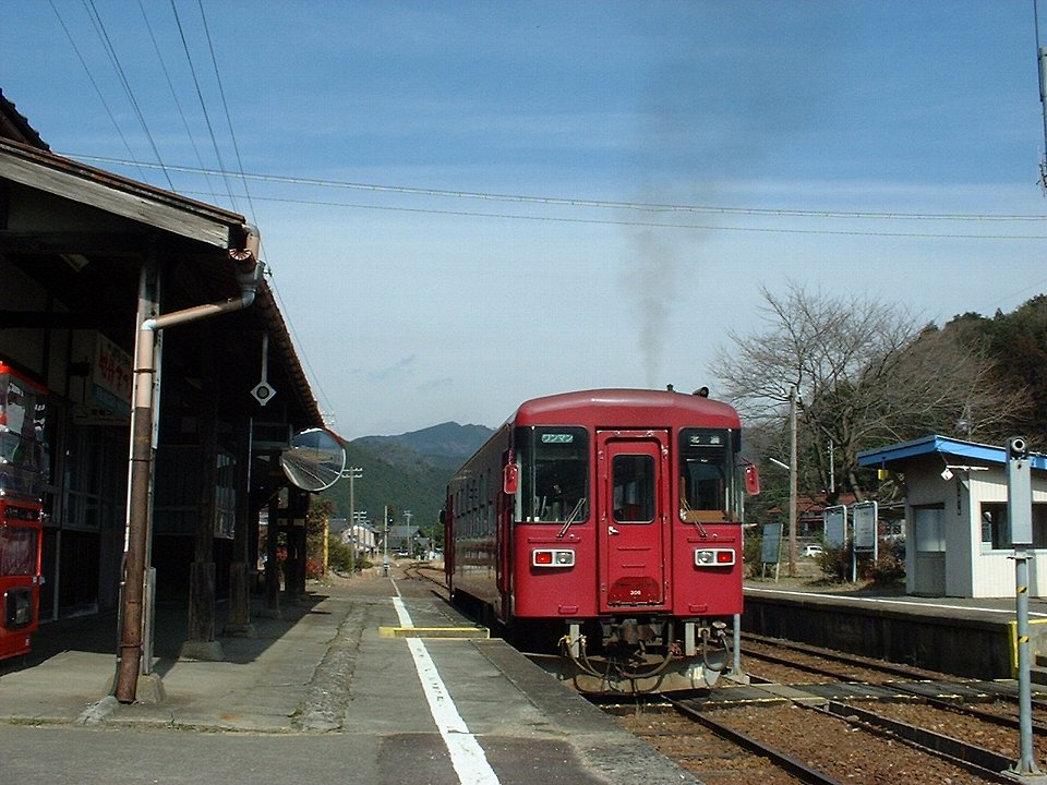 大矢駅を発車する北濃行き気動車